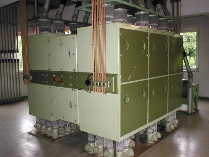 Plansichter des Herstellers MIAG Braunschweig / Bühler Braunschweig in der Getreidemühle in Zuzenhausen bei Heidelberg. Das Gerät trennt Mahlprodukte unterschiedlicher Dichte durch Rüttelbewegungen. Gut zu erkennen die Aufhängung an Bambusstäben, die sich für die Rüttelbewegungen seit jeher als am geeignetsten erwiesen hat und noch heute verwendet wird.